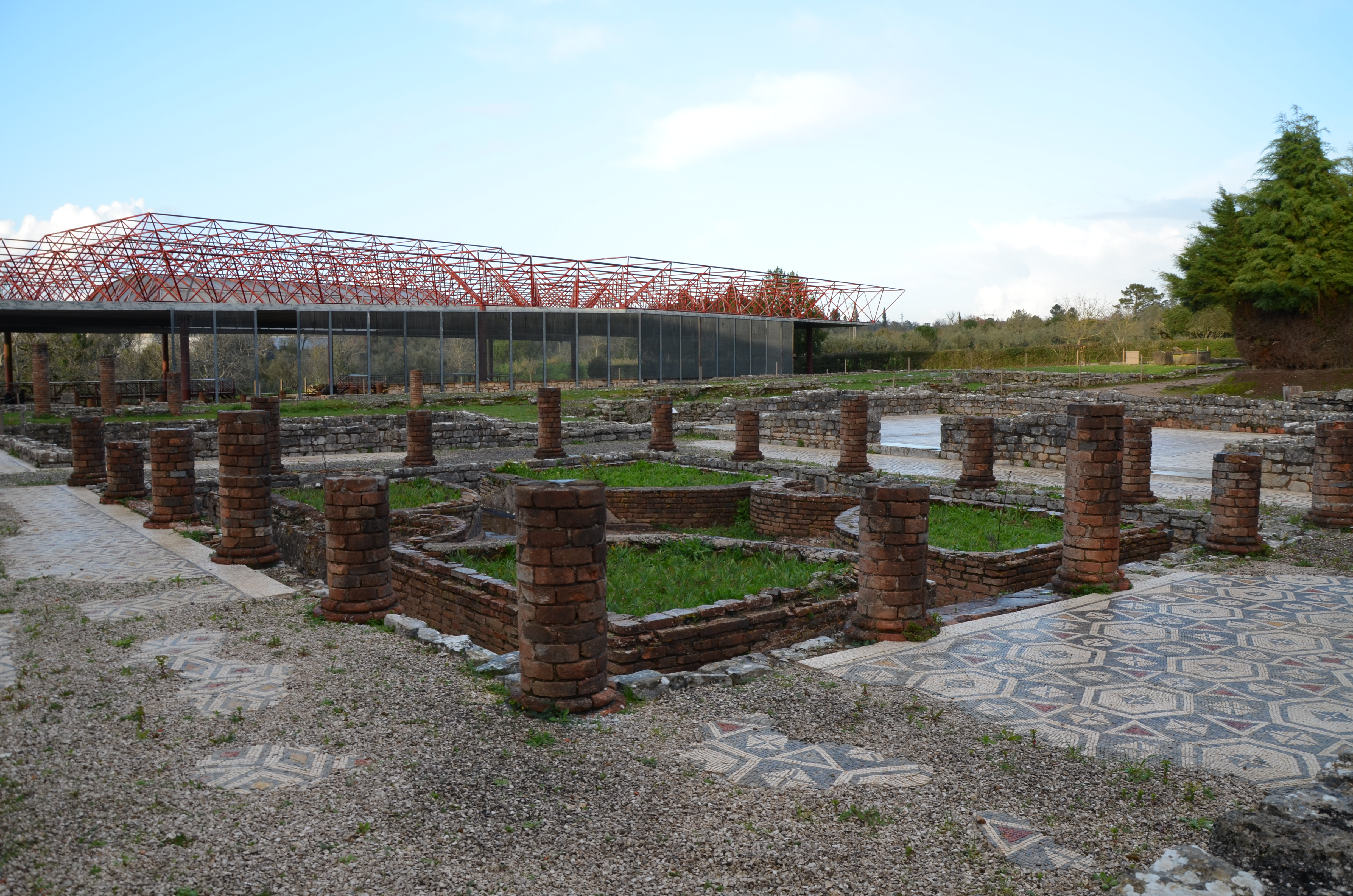 Conimbriga